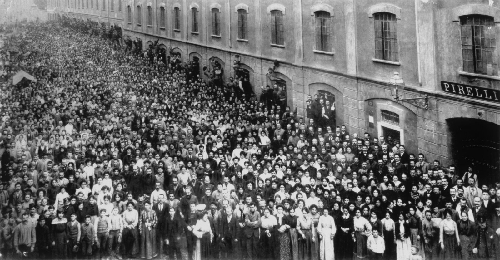 Uscita degli operai dallo stabilimento Pirelli di Via Ponte Seveso